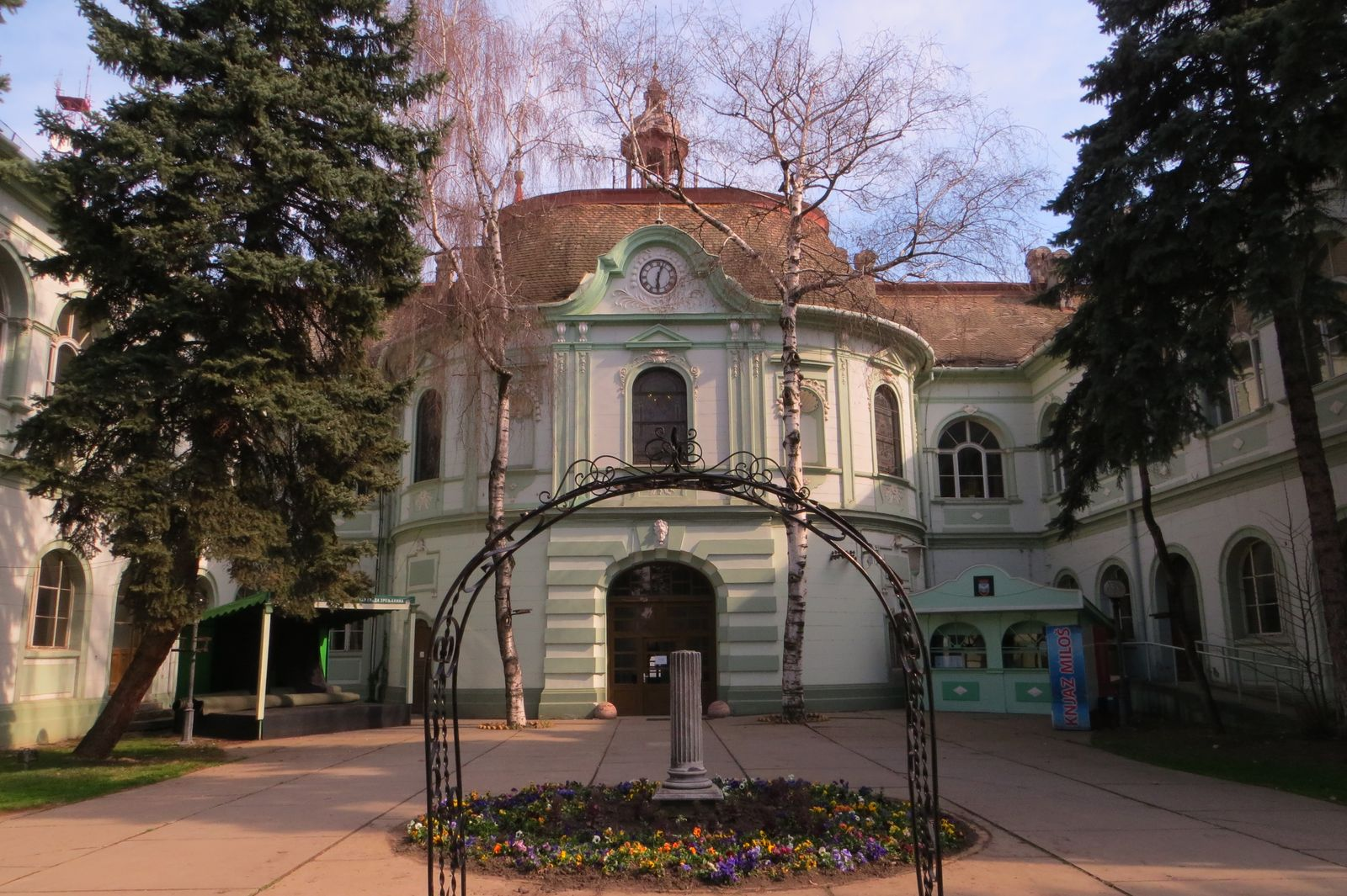 Županijski park